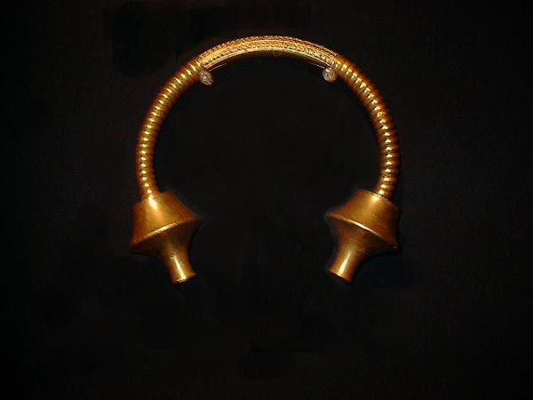 Esta peza de ouro macizo e de case dous kilos de peso, que se atopa actualmente no museo arqueolóxico de Lugo, é un bo exemplo da ourivería castrexa. Servía como colar de adorno.